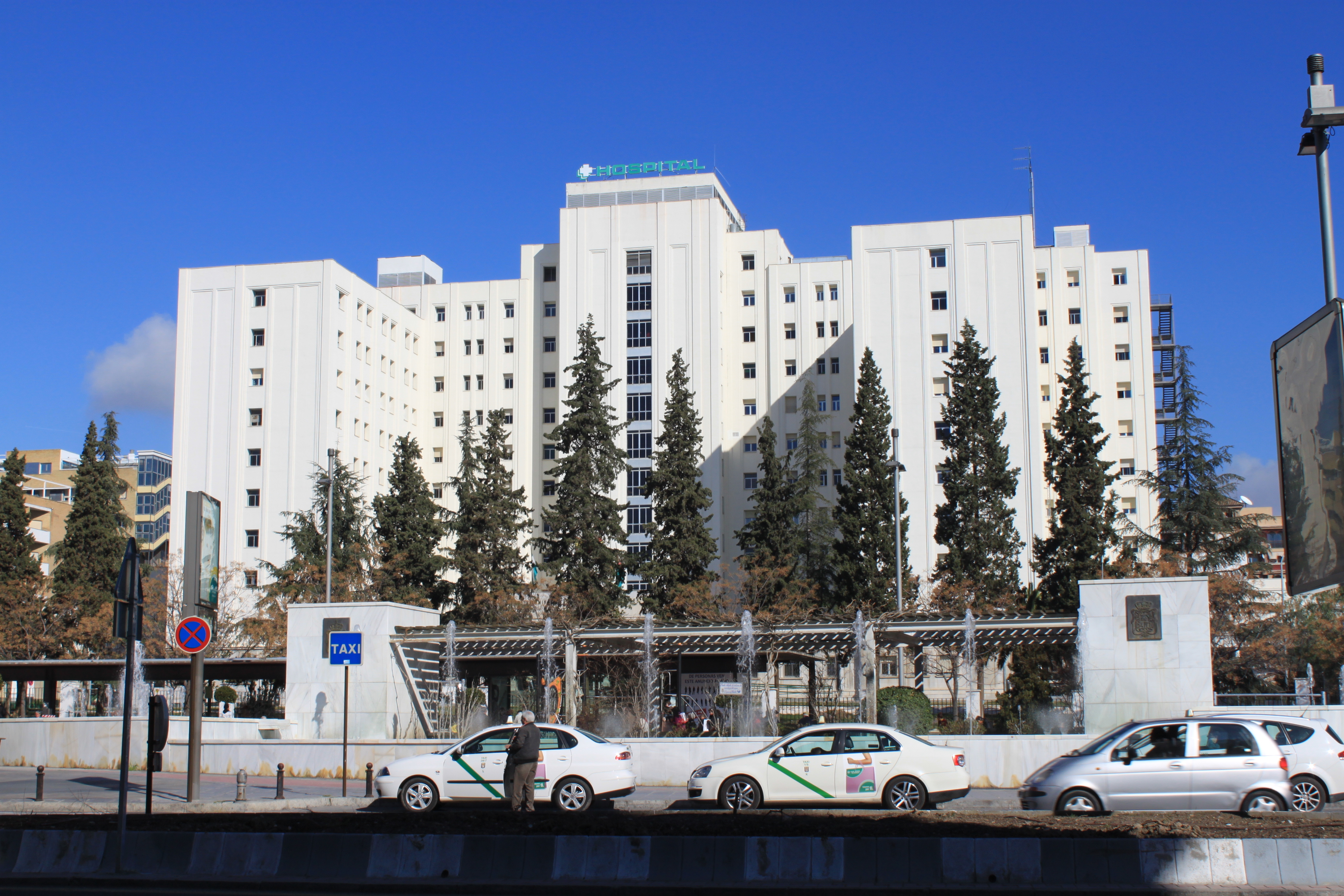 Hospital Universitario Virgen de las Nieves de Granada, España